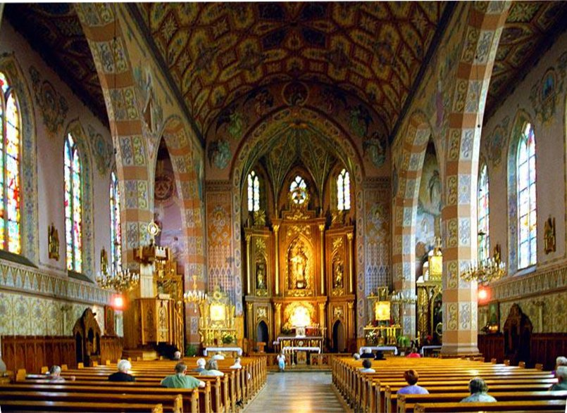 Kościół Najświętszego Serca Pana Jezusa w Ełku